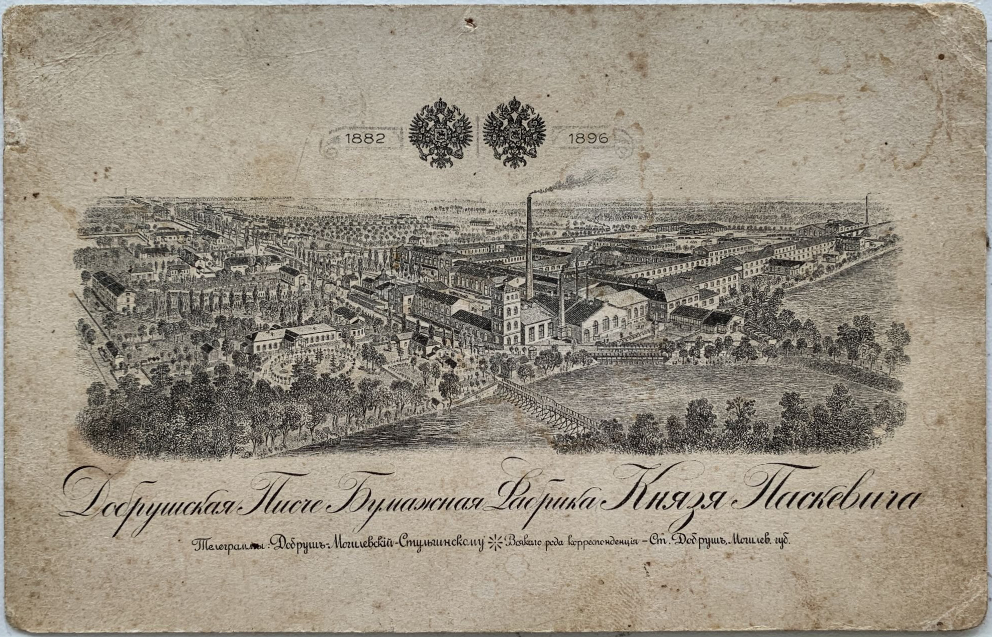 Беларуская (тарашкевіца): Добруш (Dobruš), папяровая фабрыка князя Паскевіча (Paskievič)